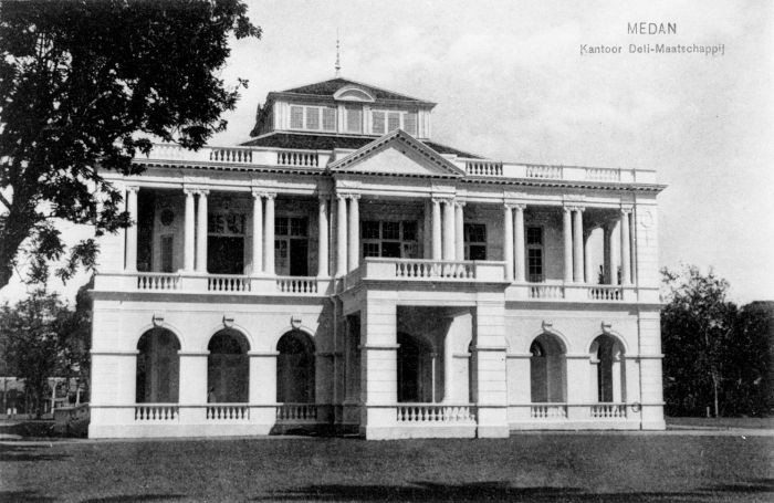 Foto. Het hoofdkantoor van de Deli Maatschappij in Medan